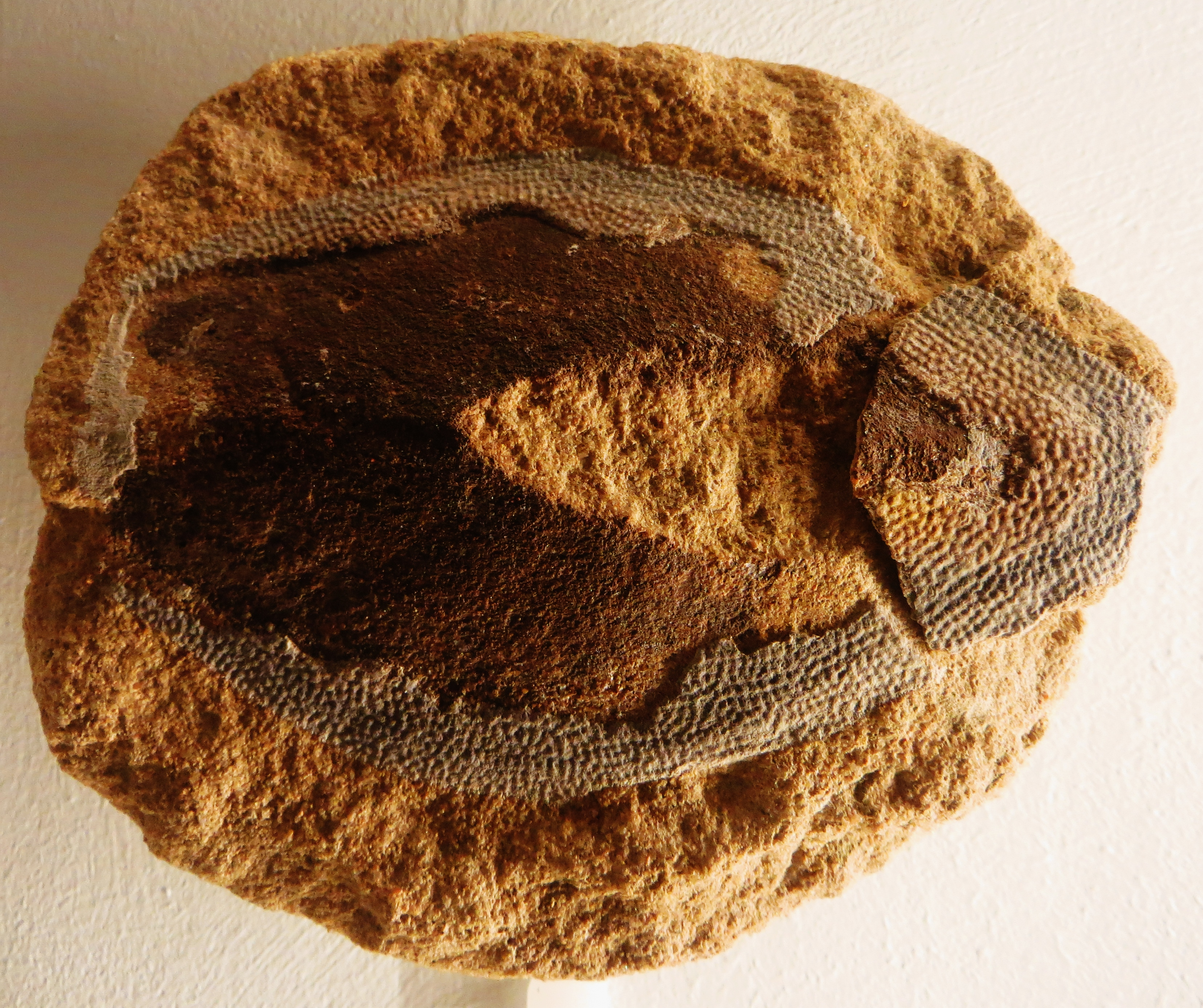 Fossil of Asterolepis, an extinct fish- Took the picture at Museum of Paleontology of Tuebingen